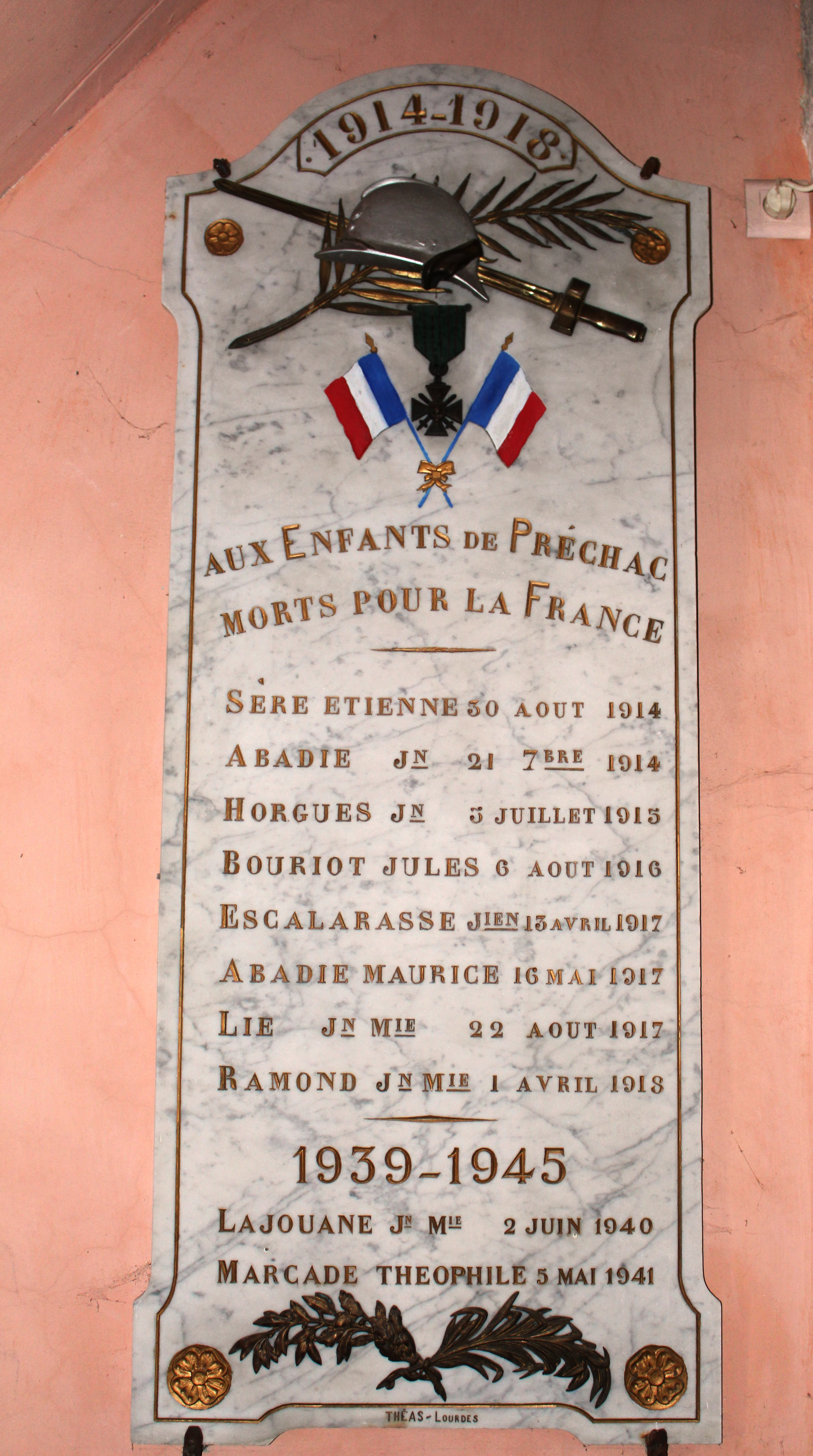 Monument aux morts de Préchac (Hautes-Pyrénées)